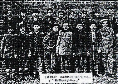 Członkowie łódzkiej Federacyjnej Grupy Anarchistów-Komunistów "Międzynarodówka" w 1906 r.